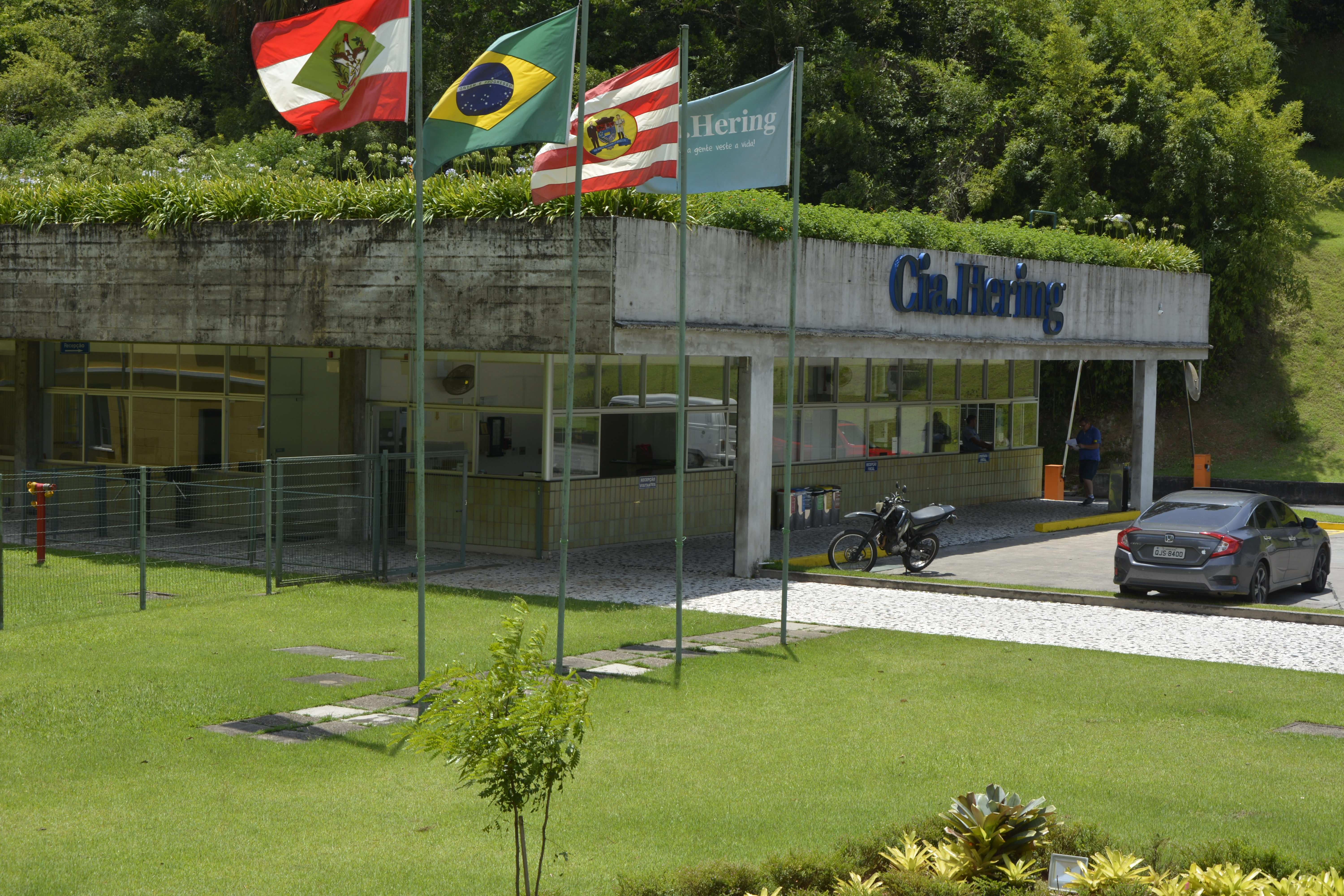 Companhia Hering é uma empresa brasileira especializada em vestuário. Seu principal produto, a marca Hering, também é sinônimo do grupo empresarial como um todo, que abrange também as marcas Hering Kids (moda infantil), Dzarm e PUC (moda infantil).